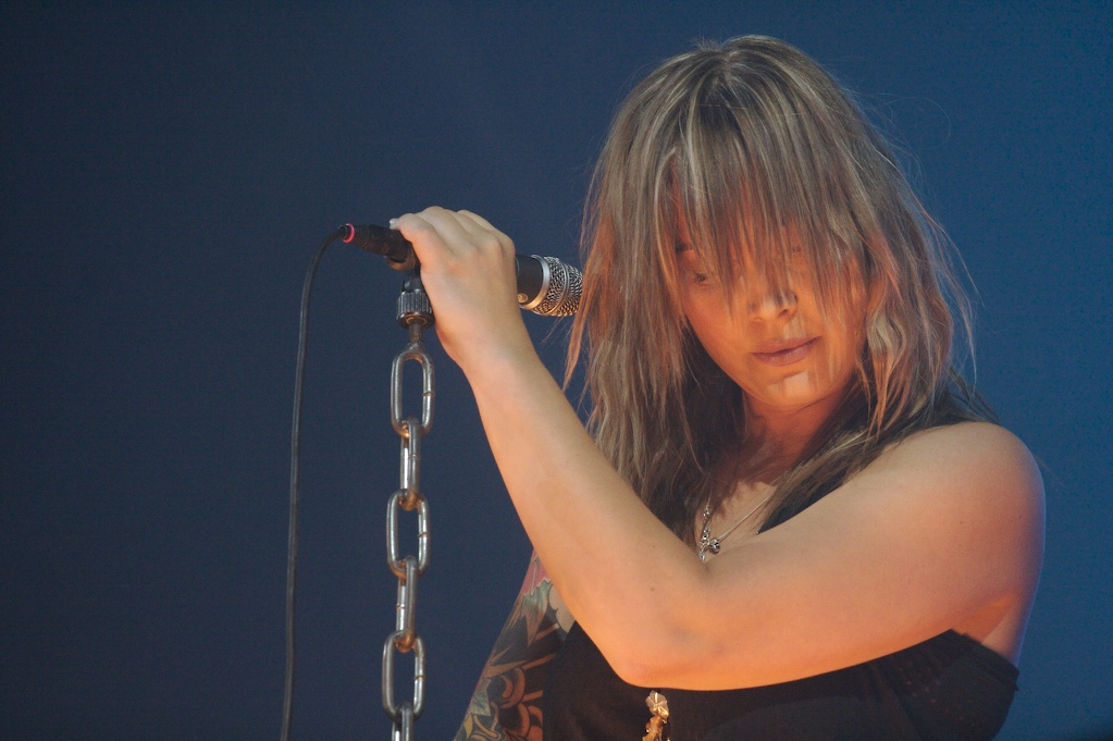 Live foto van zangeres Anouk op Lowlands 2006. Vrij werk.